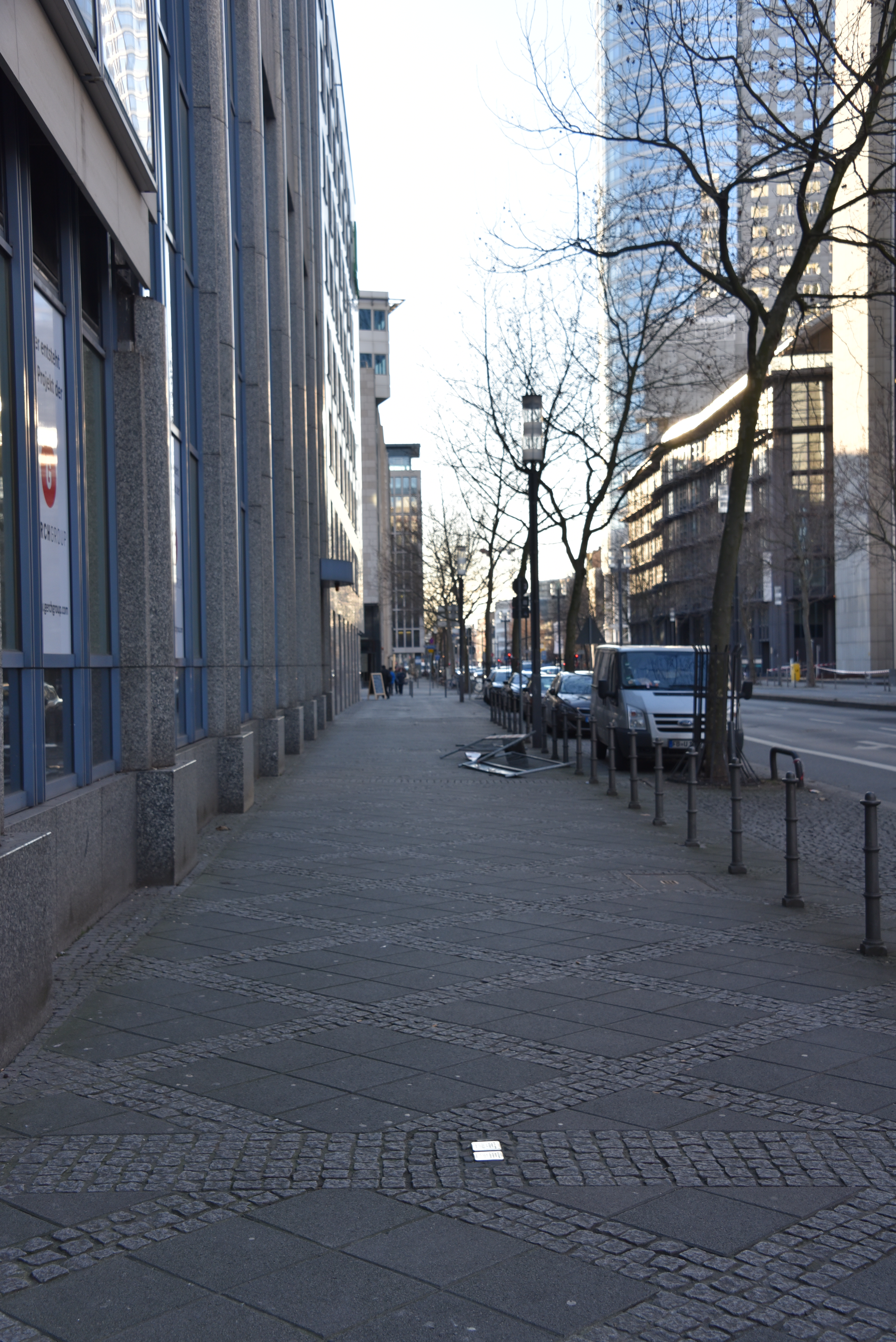 Stolperstein in Frankfurt am Main